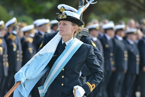 Eliana Krawczyk